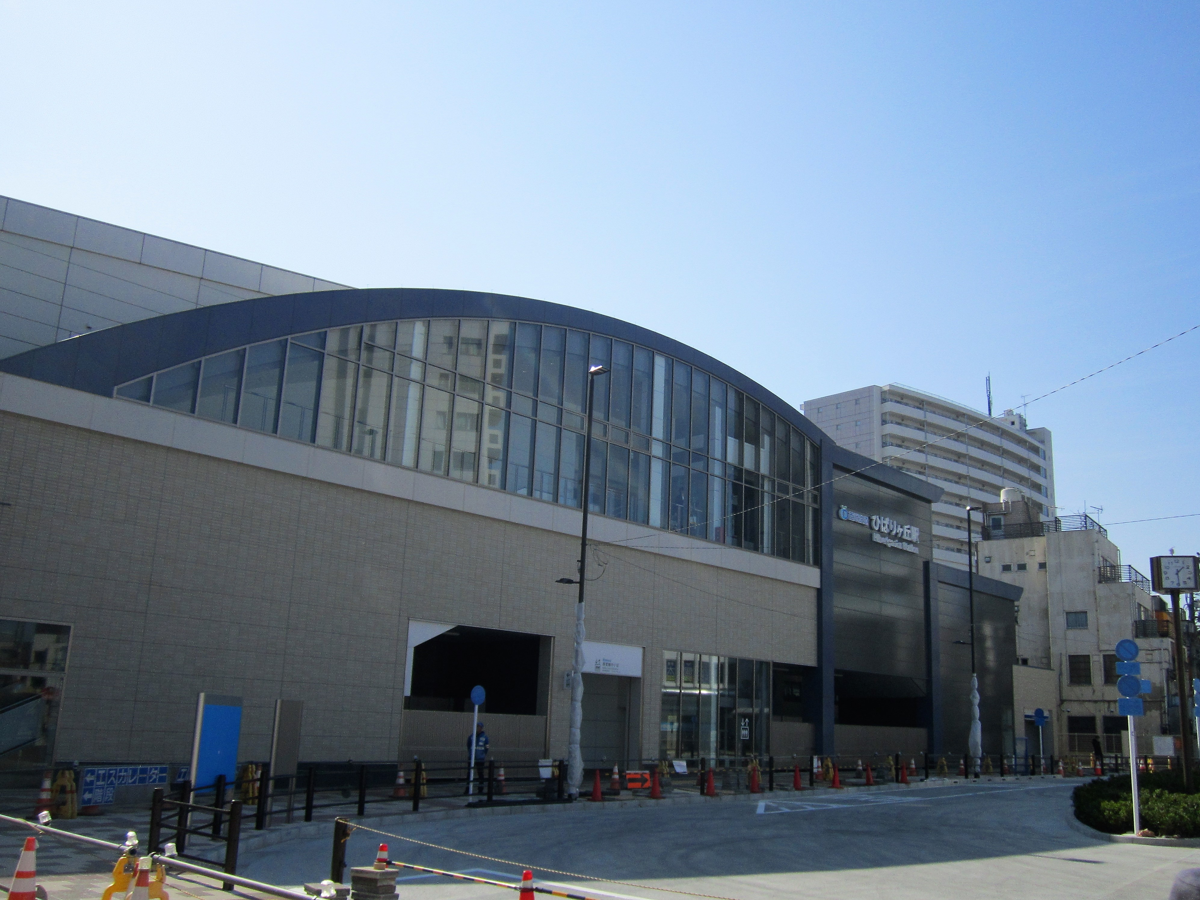 ひばりヶ丘駅北口の新駅舎 Canon PowerShot A2200